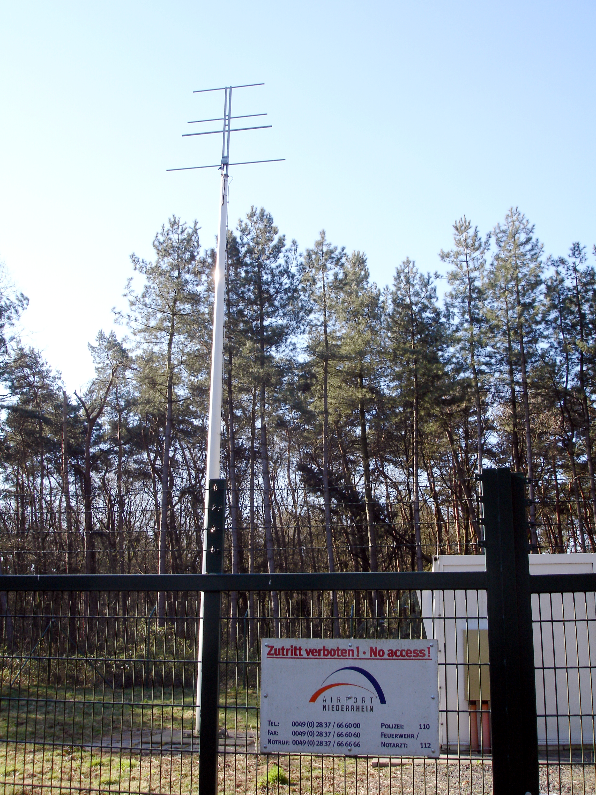 Outer Marker der Landebahn 27